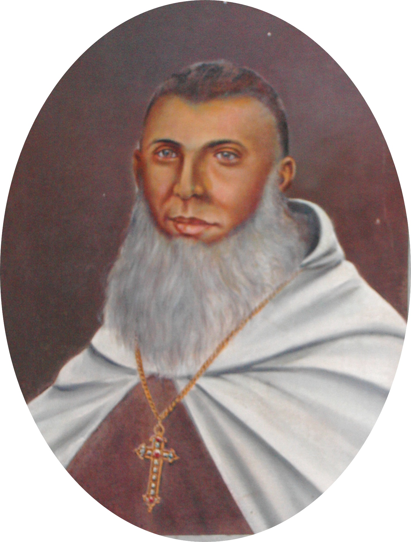 Bischof Charles Hyacinth Valerga (+ 1864), Ölgemälde (1870) im Bischofshaus Quilon, Indien